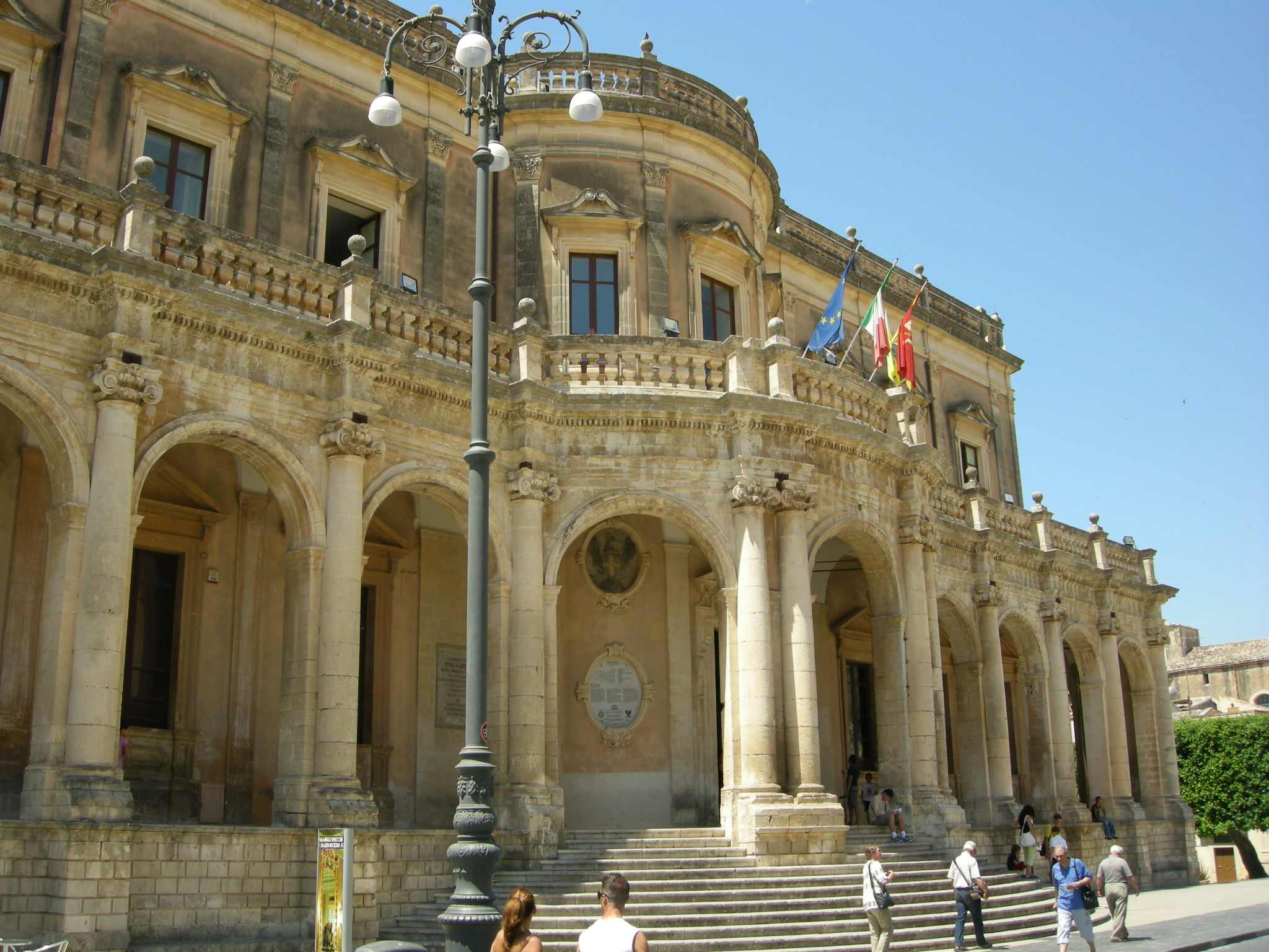 Noto, palazzo ducezio